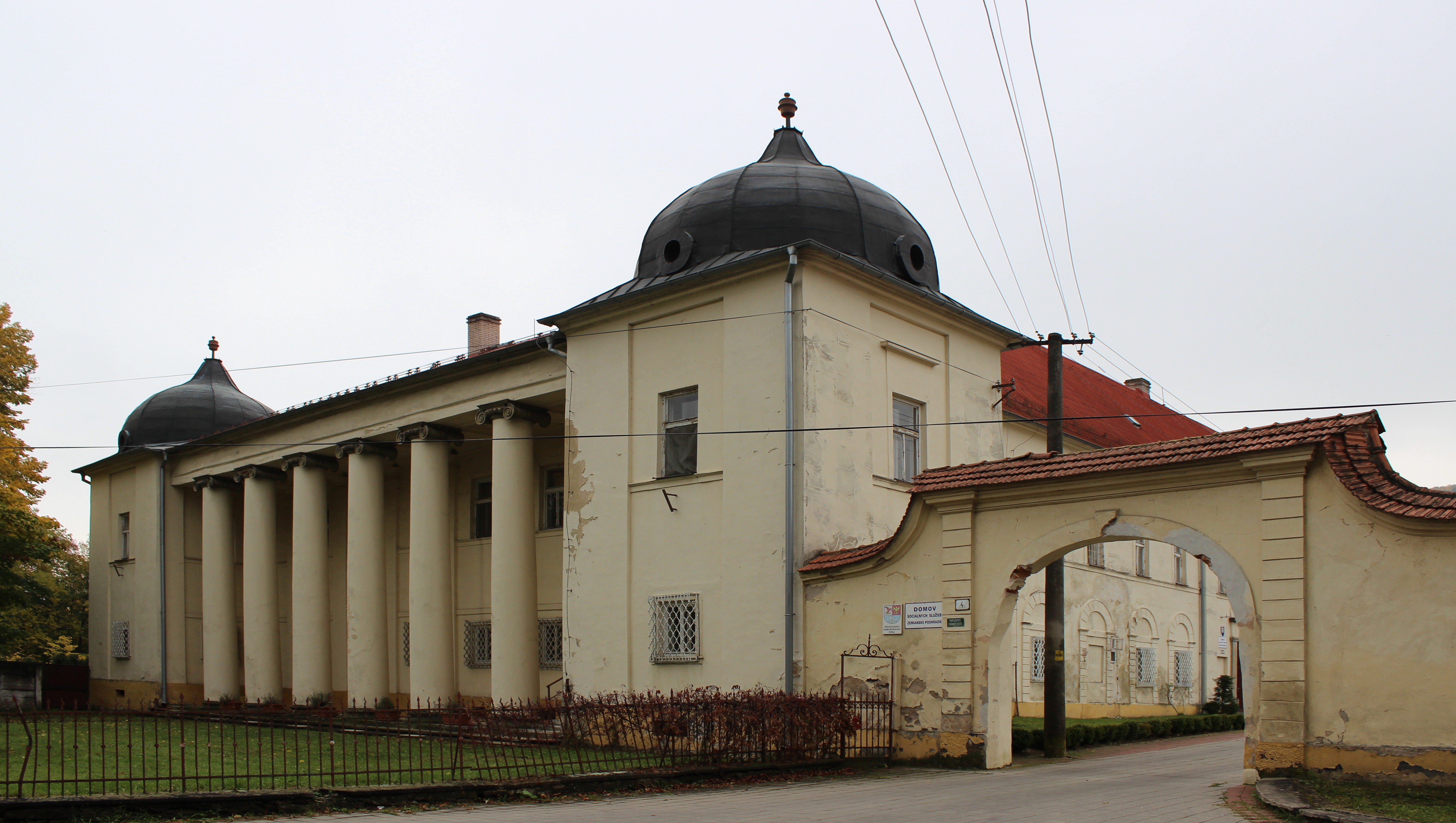 Kaštel v Zemianskem Podhradie (severovýchodní průčelí).